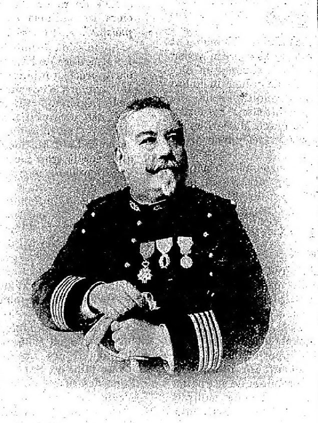 Portrait de Philippe Thomas